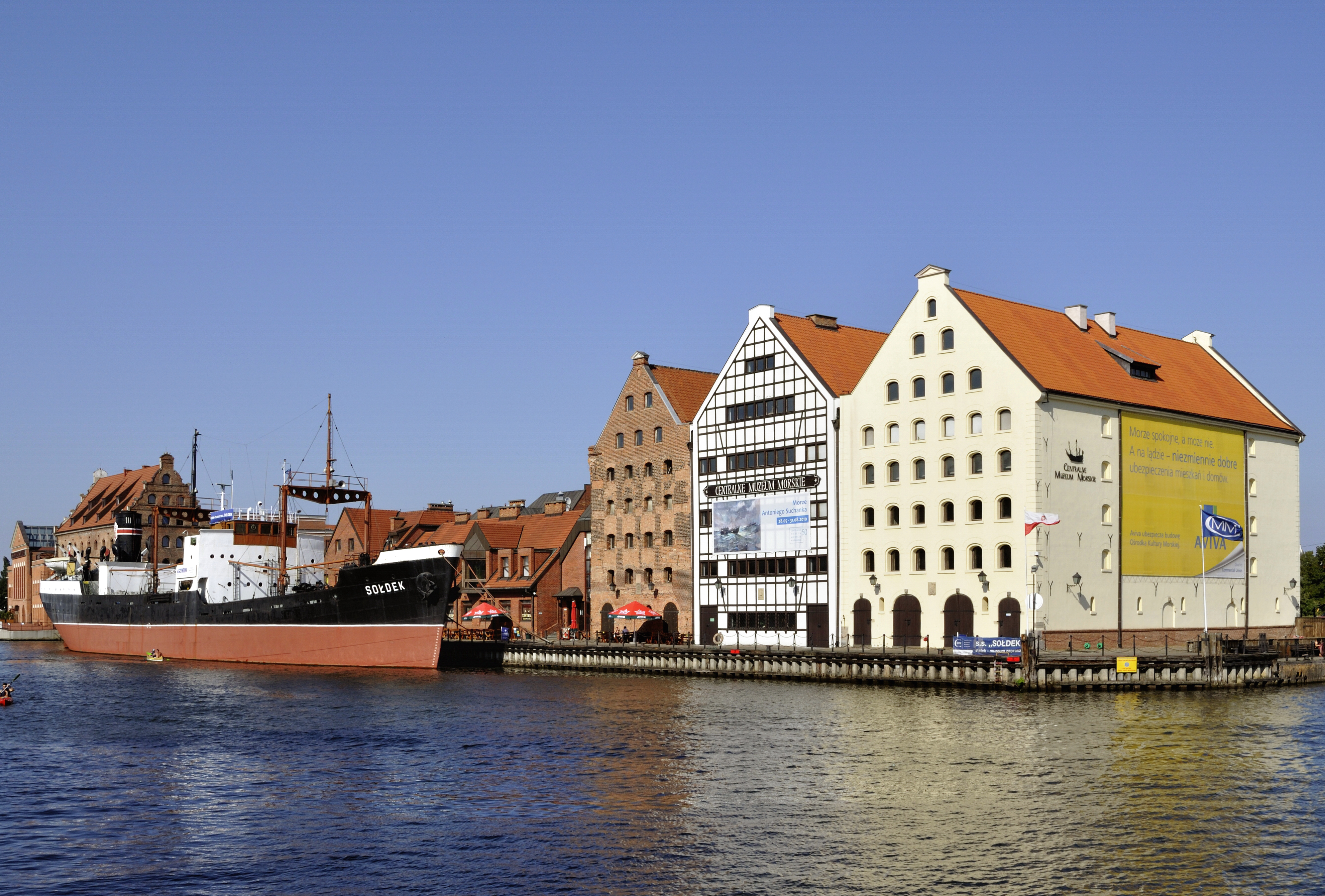 Picture taken in Gdańsk after Wikimania 2010 conference. Centralne Muzeum Morskie and SS Sołdek.